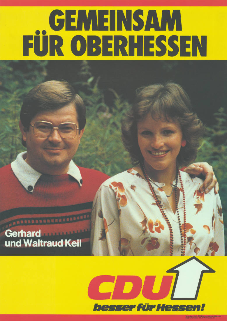 Gemeinsam für Oberhessen Gerhard und Waltraud Keil CDU besser für Hessen! Abbildung: Foto Plakatart: Kandidaten-/Personenplakat mit Porträt Auftraggeber: Verantw.: CDU-Landesverband Hessen, Wiesbaden Objekt-Signatur: 10-007 : 582 Bestand: Landtagswahlplakate Hessen (10-007) GliederungBestand10-18: Landtagswahlplakate Hessen (10-007) » CDU Lizenz: KAS/ACDP 10-007 : 582 CC-BY-SA 3.0 DE